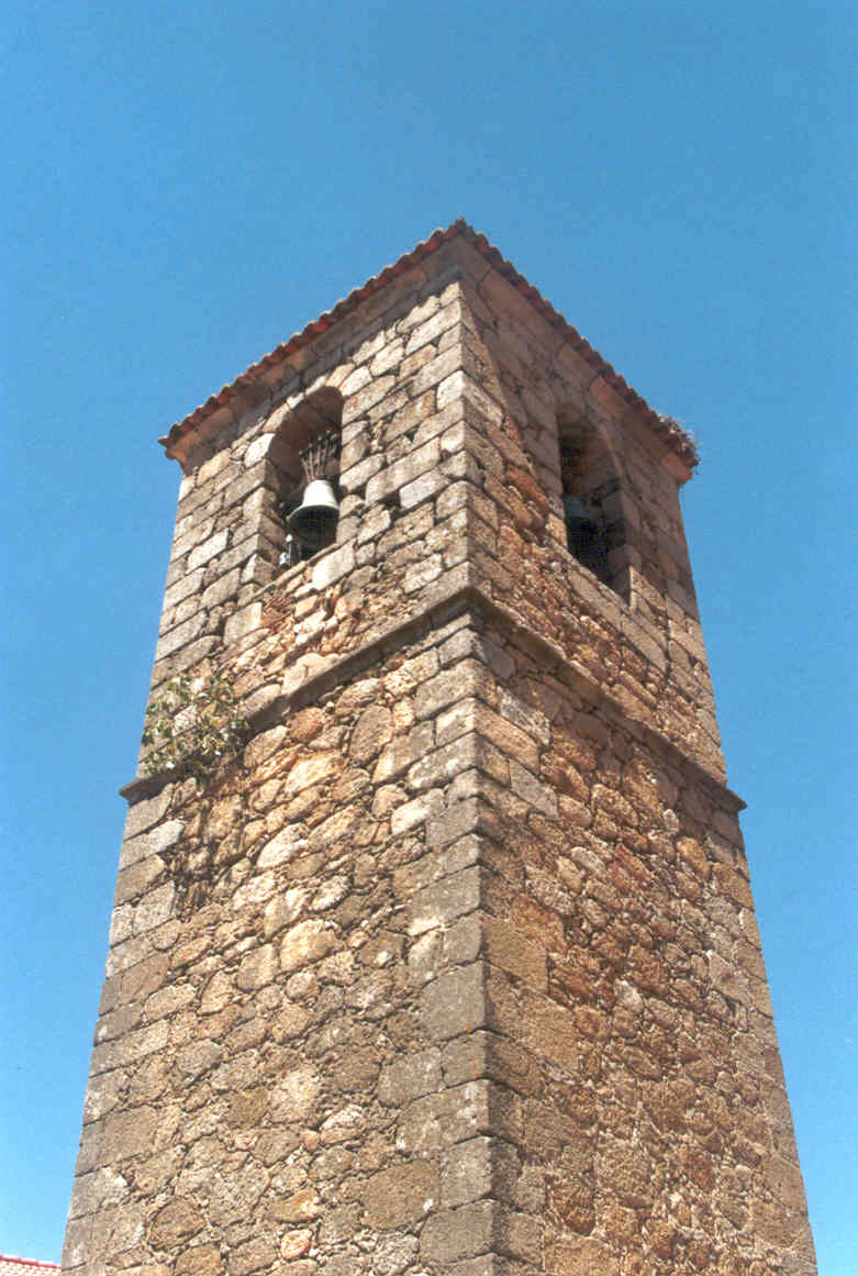 torre vigía templaria